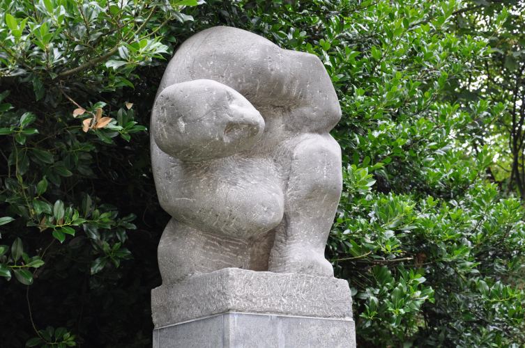 Het Buikschot Locatie: Tugelaweg, Amsterdam Kunstenaar: Adam Jansma (1929-1965) Materiaal: hardsteen Jaartal: 1962 Foto © Gus Maussen